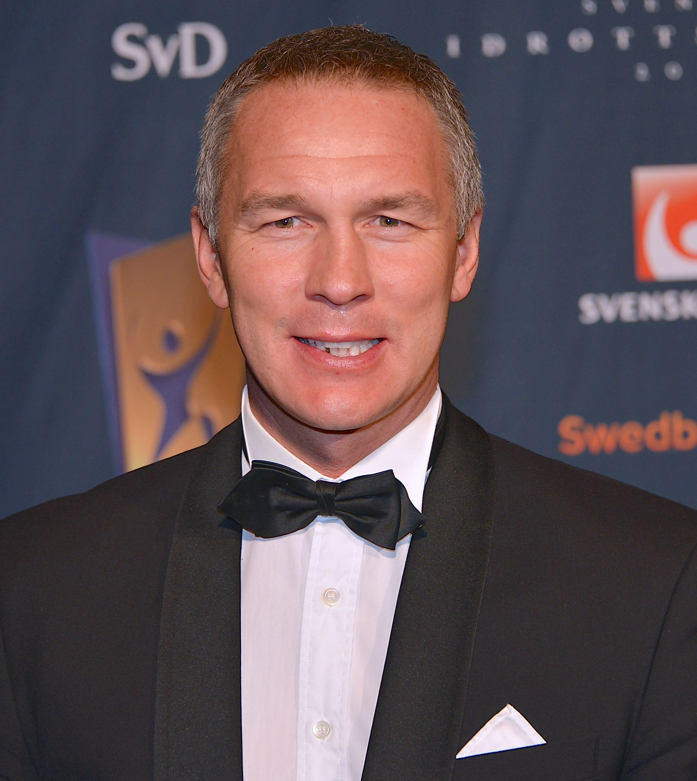 Patrik "Bjärred" Andersson på Idrottsgalan på Globen i Stockholm den 14 januari 2013.